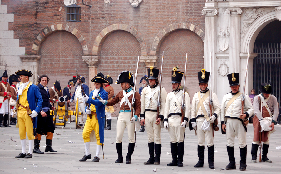 Milizie venete combattano durante la rievocazione delle Pasque Veronesi (in marrone-bianco artiglieri veneti, in oro-azzurro la Guardia Nobile Veronese, in bianco le truppe asutriache che, liberate dagli insorti, combatterono al loro fianco.)